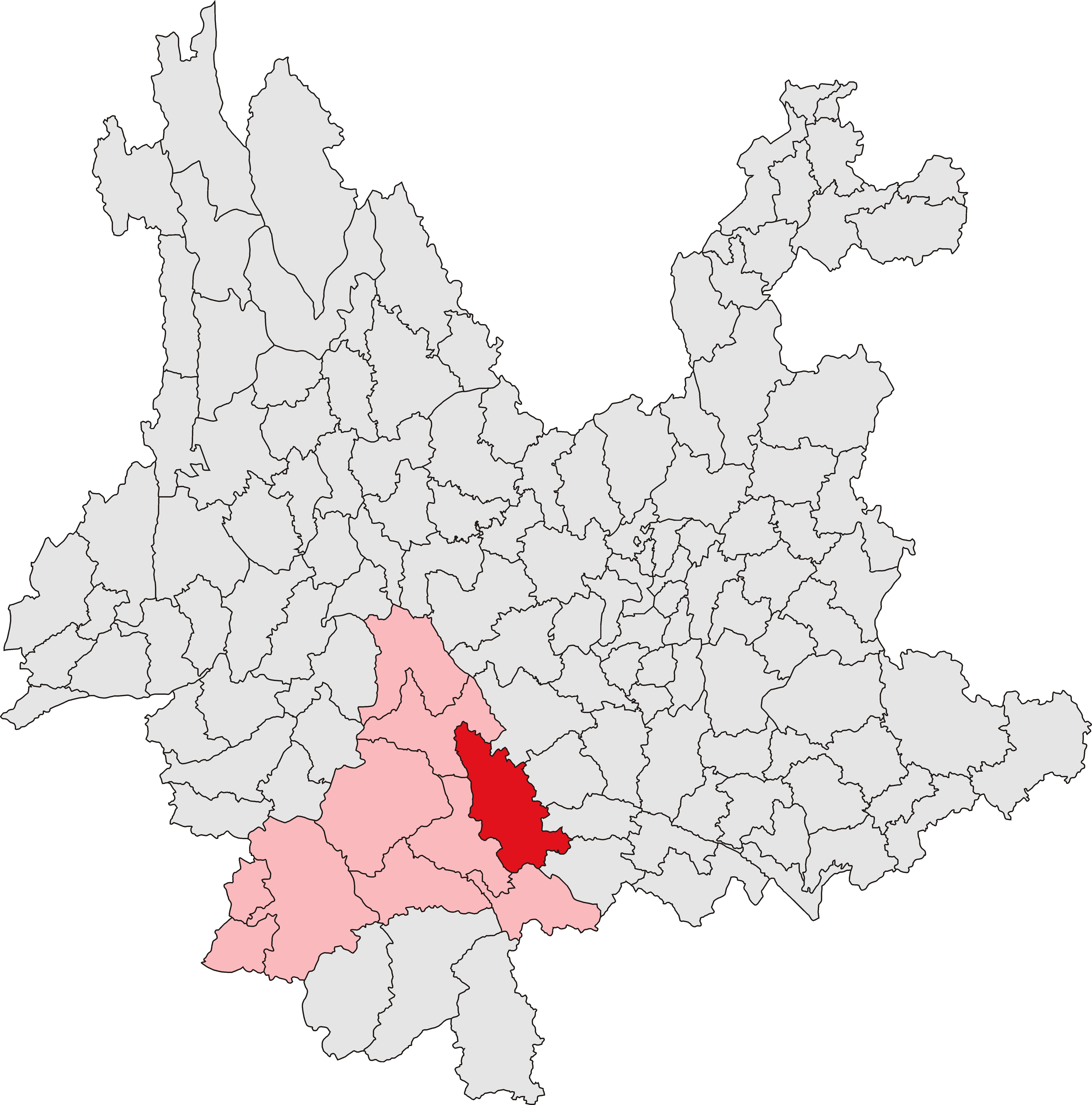 中文（中国大陆）: 墨江哈尼族自治县位置图